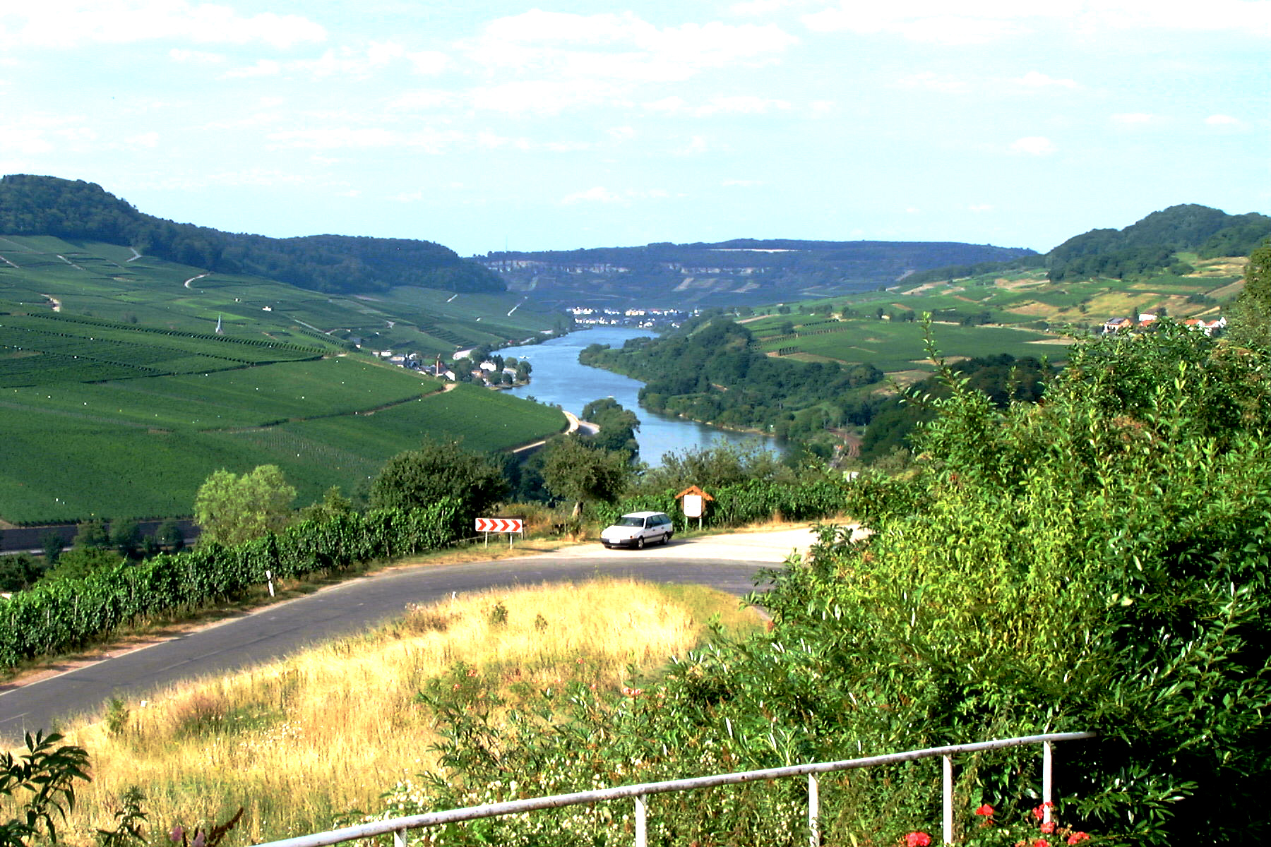 Die Obermosel